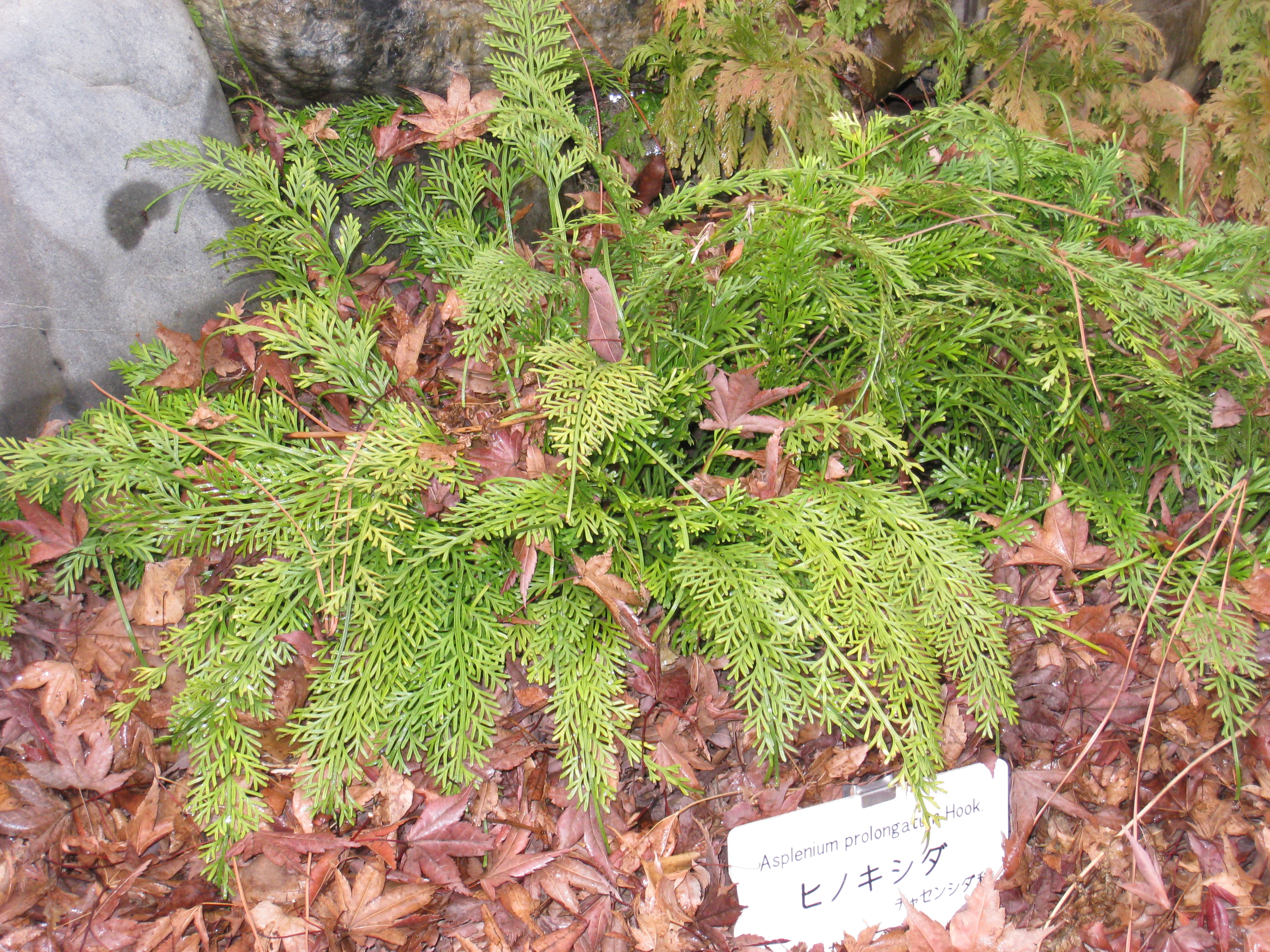 Asplenium prolongatum Hook in Koishikawa Botanical Gardens, Tokyo, Japan.